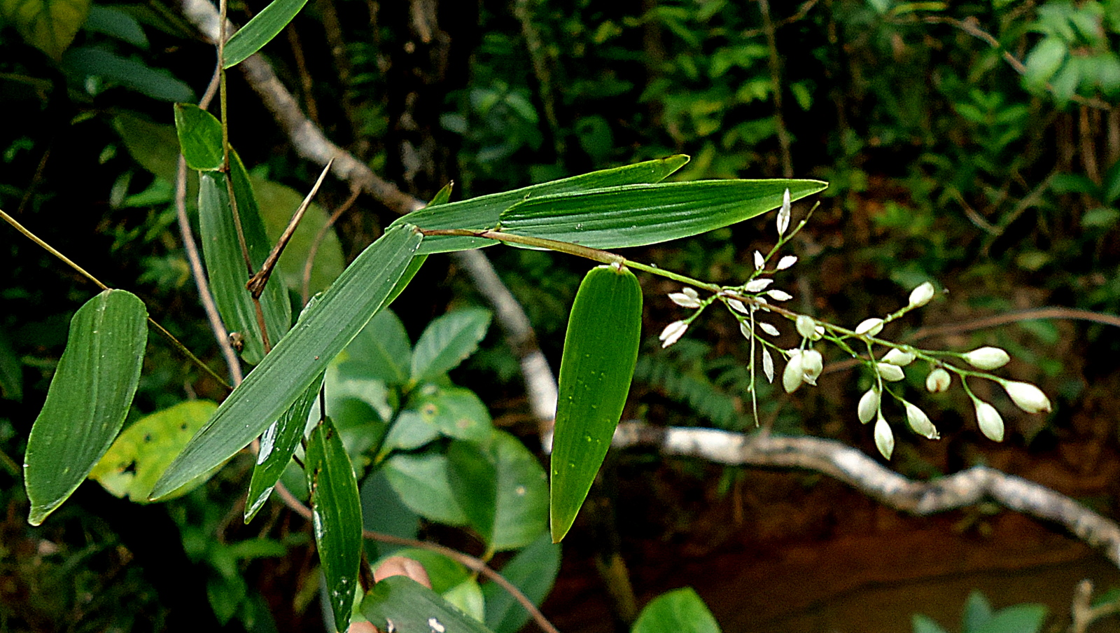 Parodiolyra ramosissima (Trin.) Soderstr. & Zuloaga